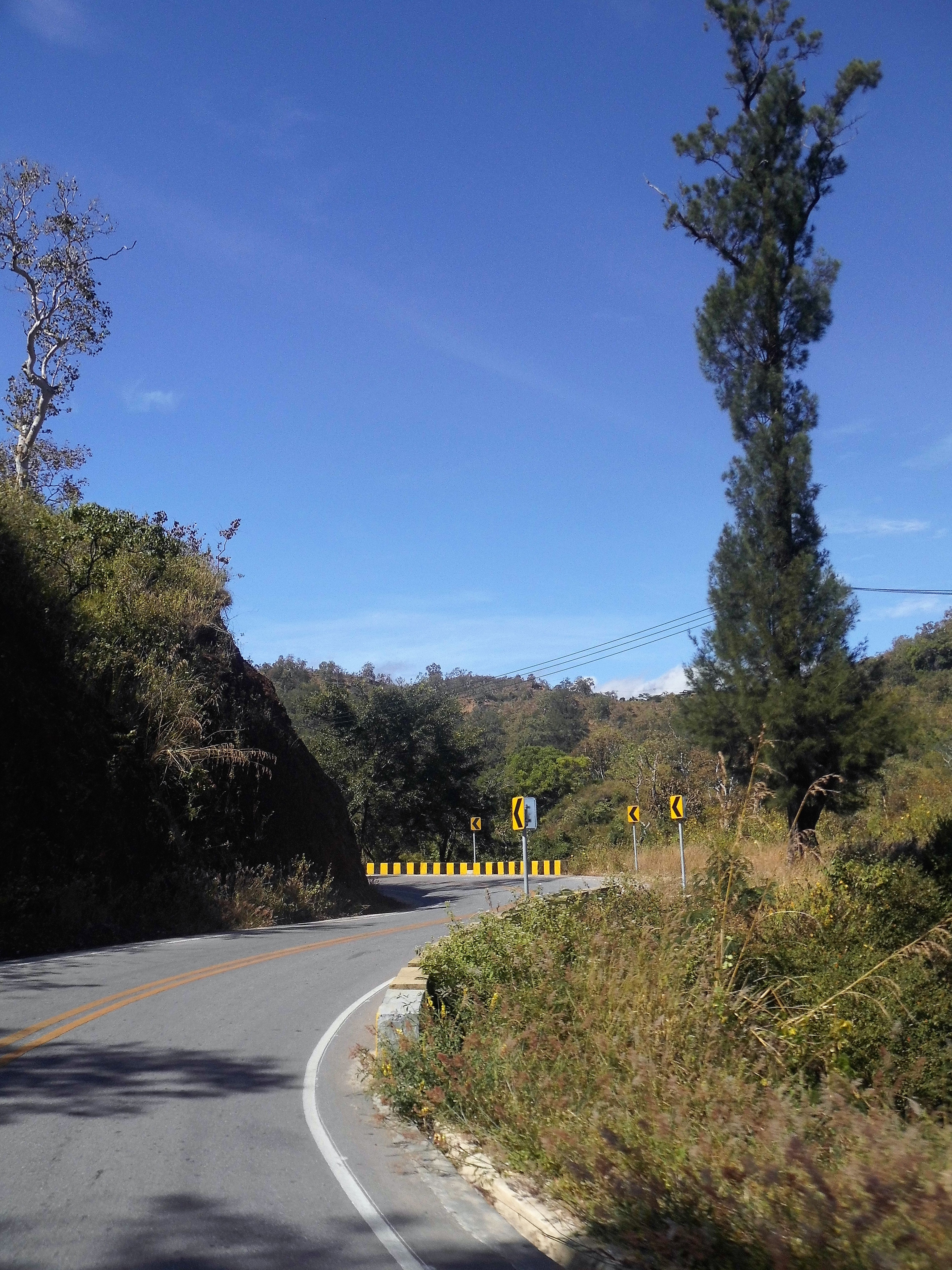 Fahrt von Dili nach Maubisse